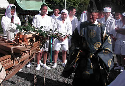 静岡県牧之原市細江で催される神明神社の御船神事